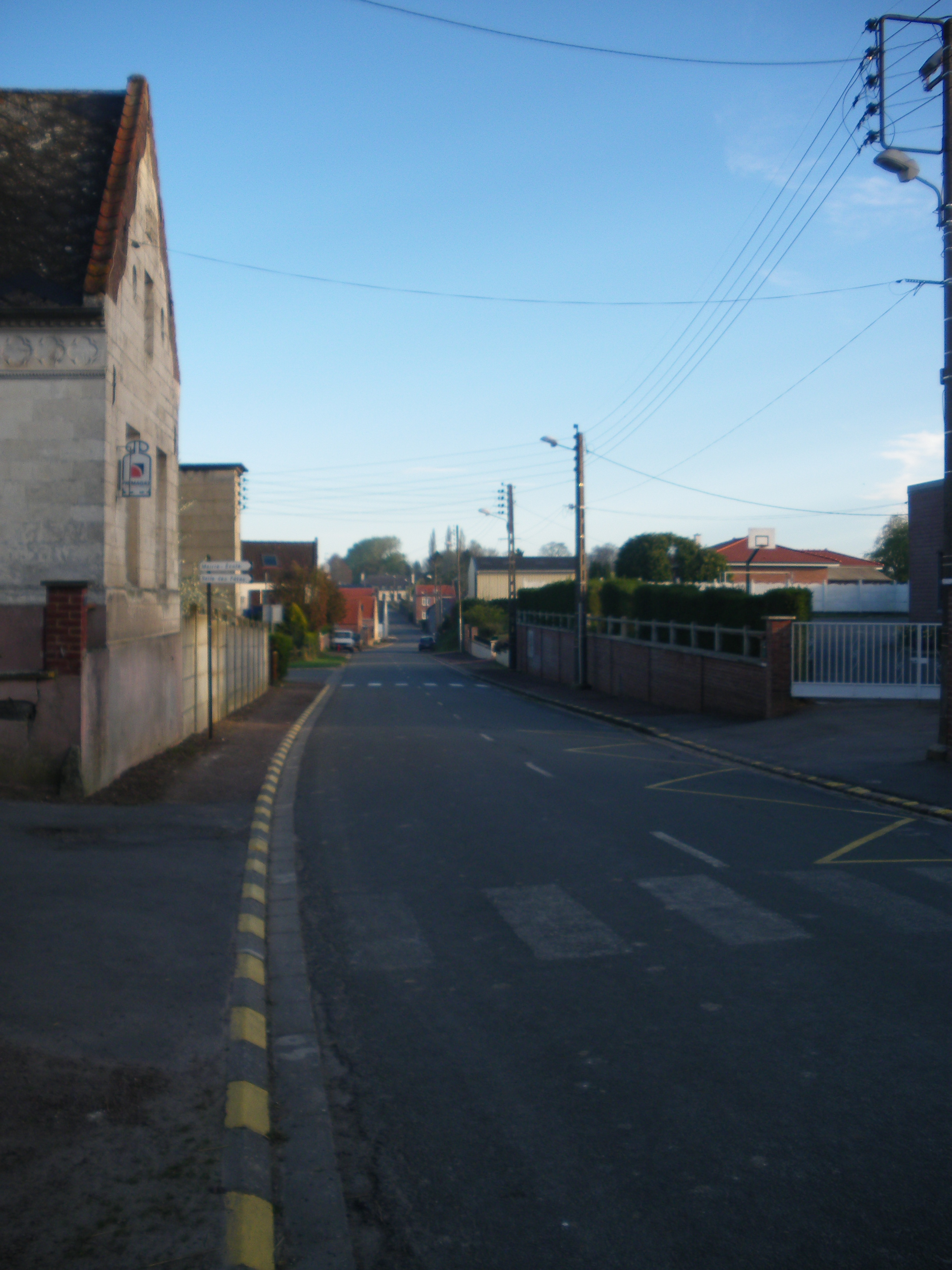 Vue de la Grande rue de Simencourt à hauteur de la mairie.